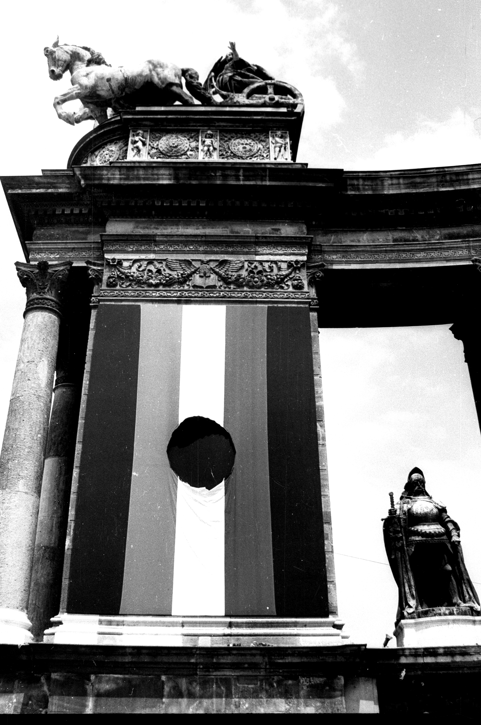 Budapest, Hősök tere, Millenniumi emlékmű 1989. június 16-án, az 56-os hősök újratemetésekor